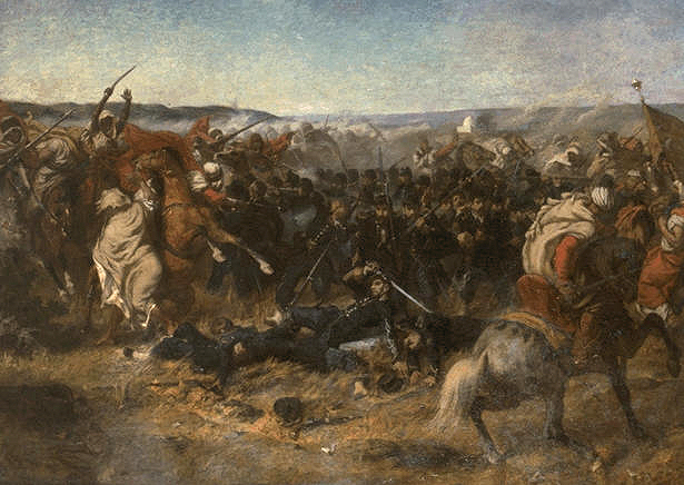 Le sujet de ce tableau a été emprunté à la relation du combat de Sidi-Brahim (26 septembre 1845) rédigée par le Duc d'Aumale pour la Revue des Deux-Mondes. "Le capitaine de Géraux, à la tête de 73 hommes de la 1ère compagnie du 8ème bataillon de chasseurs à pied, portant sept blessés, après s'être défendu pendant 3 jours dans le marabout de Sidi-Brahim, sans vivres et sans eau, contre toutes les forces d'Abd-El-Kader, essaie le 26 septembre 1845, à six heures du matin, de se faire jour à la baïonnette. Après un combat héroïque, à bout de forces et de munitions, tous les braves qui formaient la petite colonne tombent successivement autour des corps de leurs officiers, le lieutenant Chapedelaine et le capitaine de Géraux".